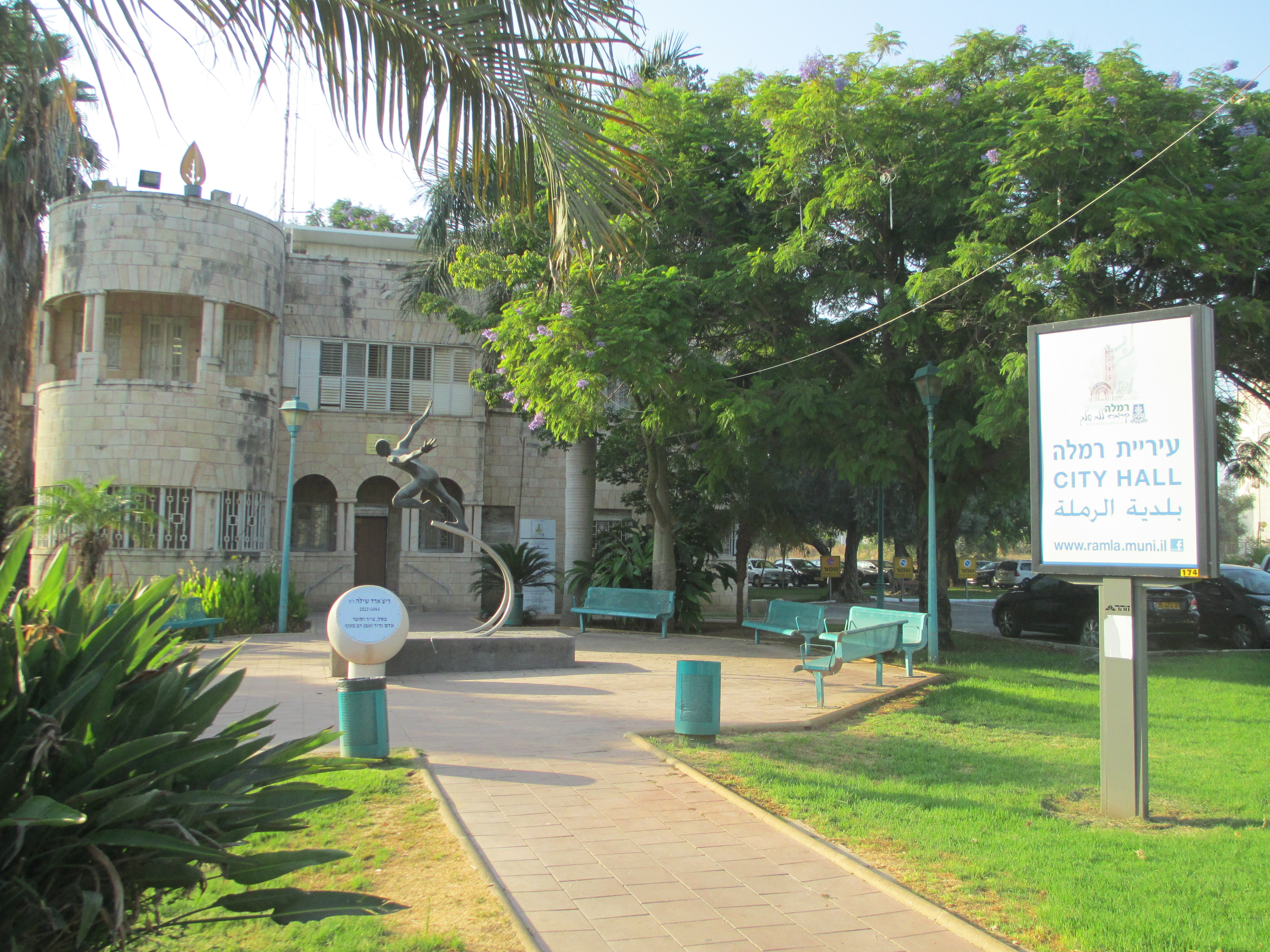 בית עיריית רמלה